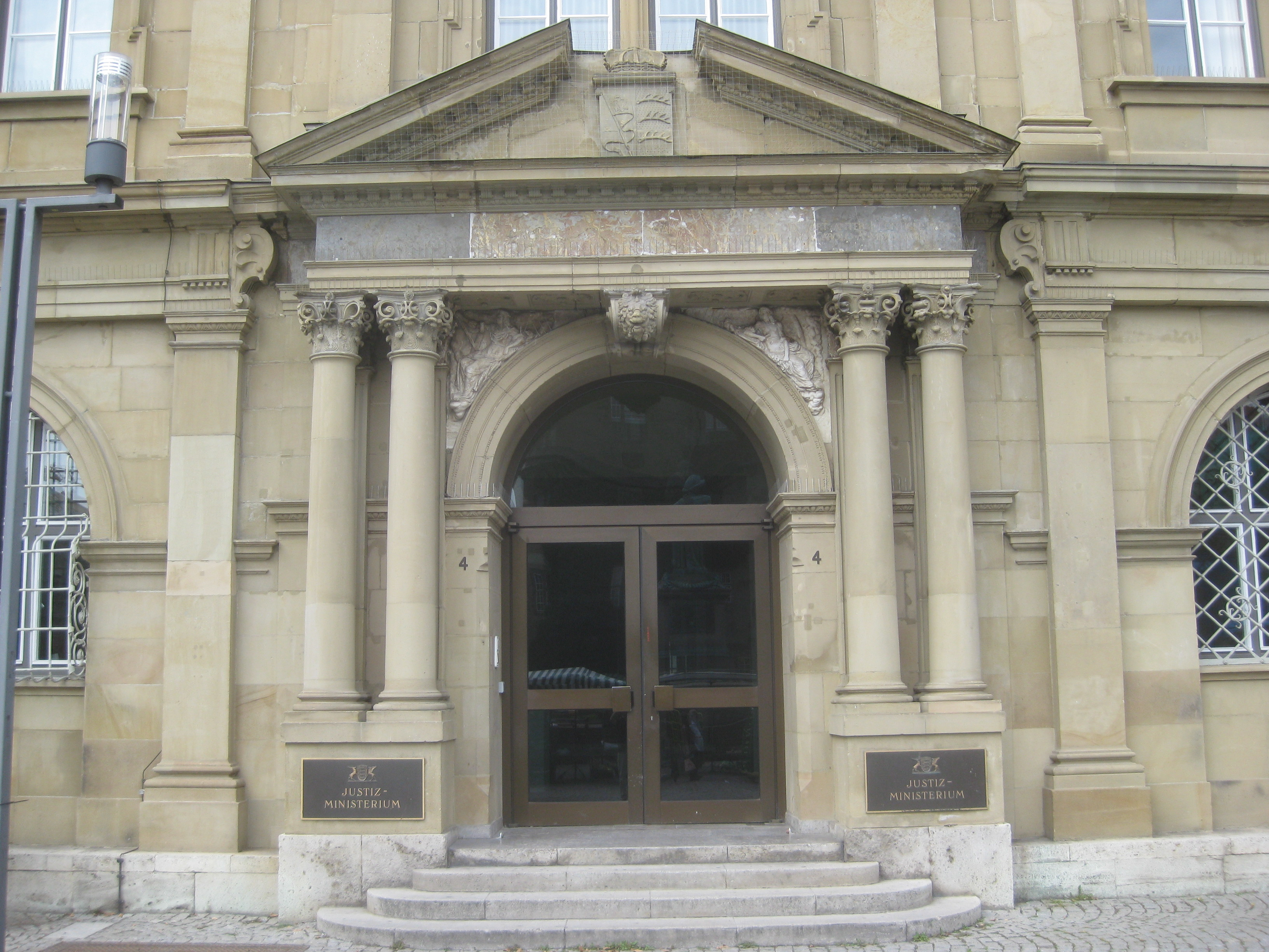 Stuttgart, Prinzenbau, , Mittelportal.